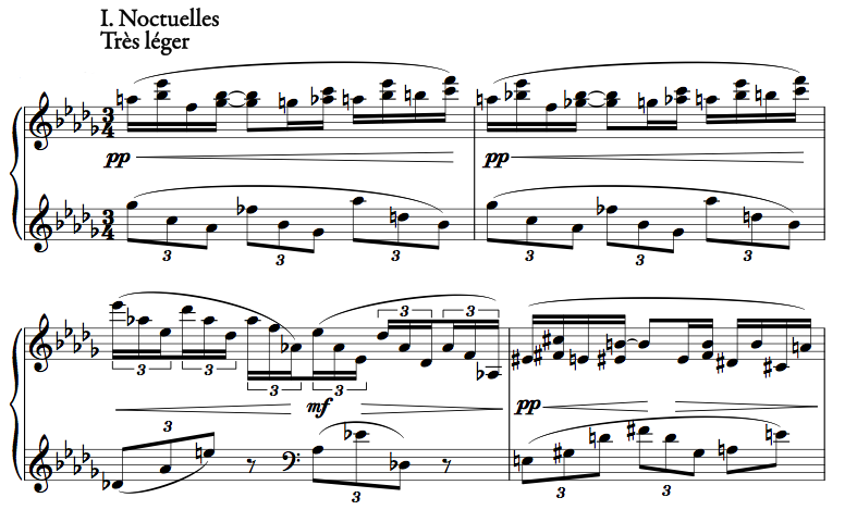 Maurice Ravel, Miroirs : V. La vallée des cloches